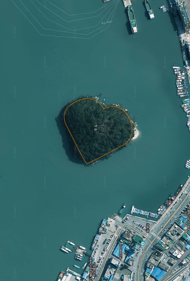 주도. 완도항 앞바다에 있는 조그마한 섬으로 마치 구슬같다하여 붙여진 이름이다. 요즘 항공촬영을 하면 섬이 하트모양을 하고 있다.